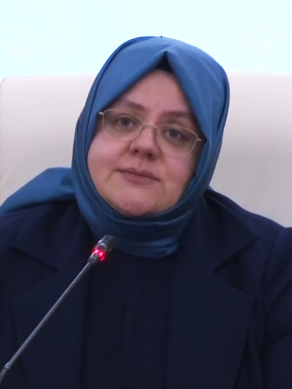 Aile, Çalışma ve Sosyal Hizmetler Bakanı